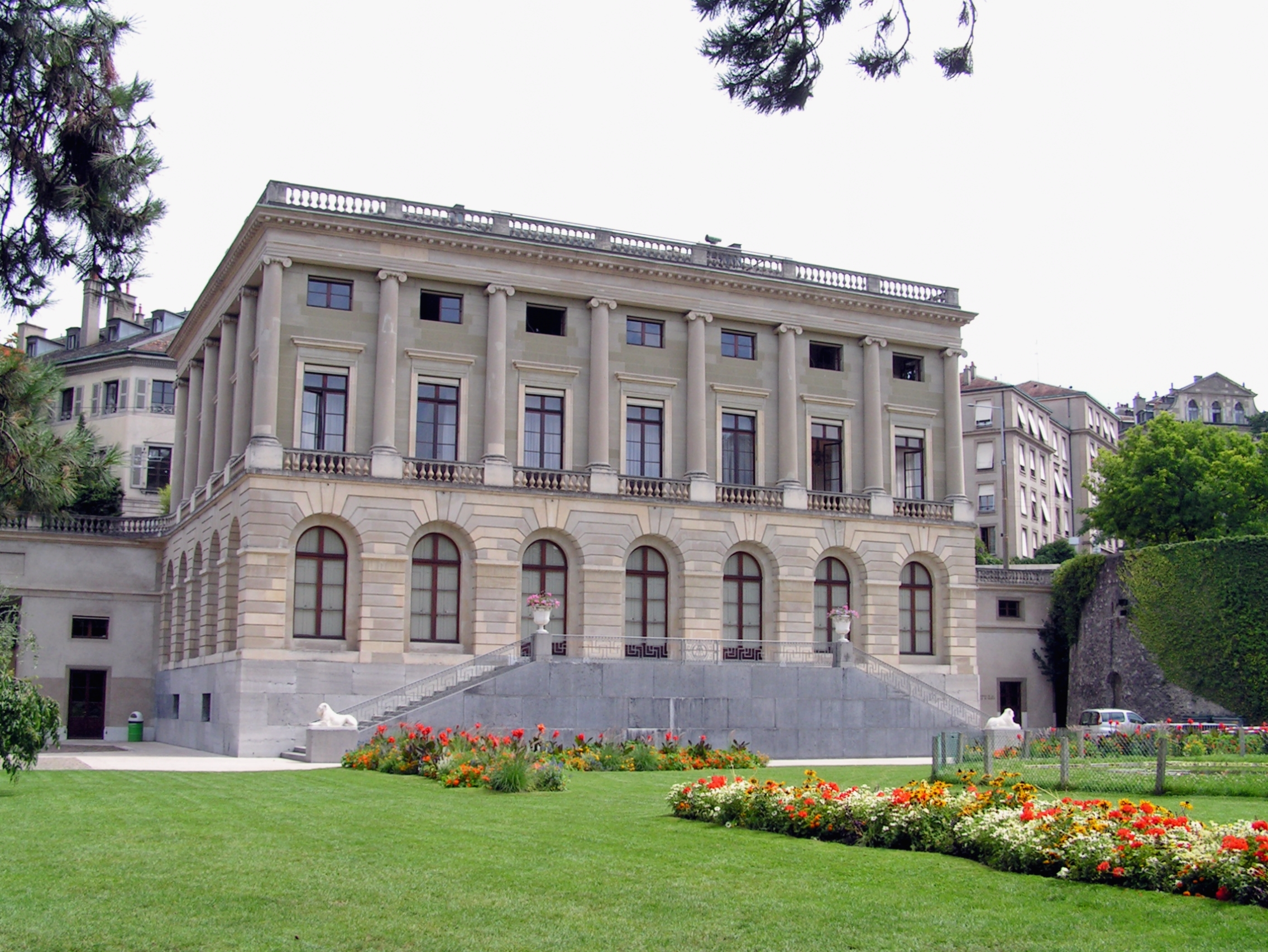 Rue de la Croix-Rouge 4, Genève. Le Palais Eynard.